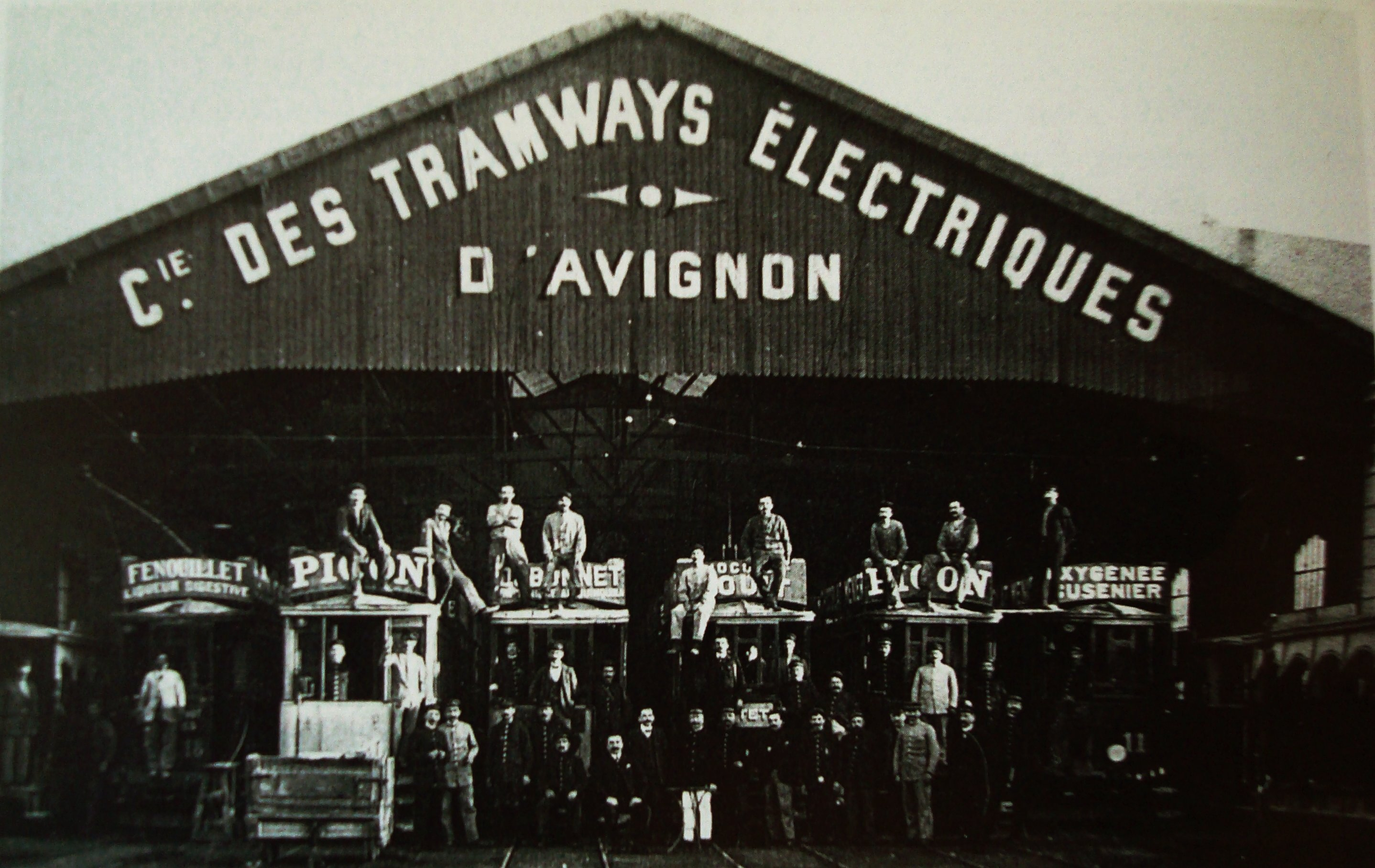 Vue du dépot du tramway d'avignon